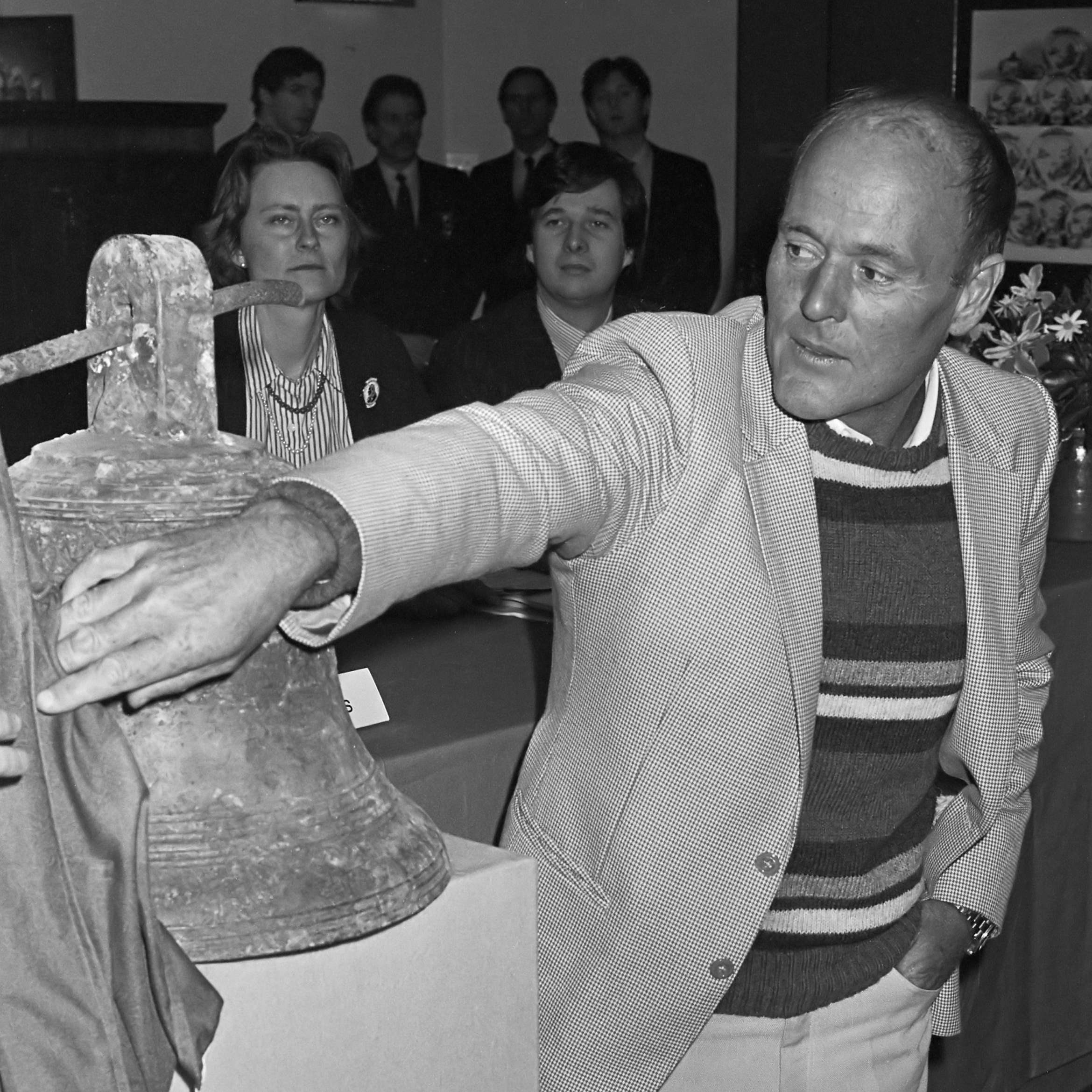 Kapitein Michael Hatcher die de bergingsoperatie van de Nanking Cargo leidde, onthult een op het schip gevonden klok 28 januari 1986